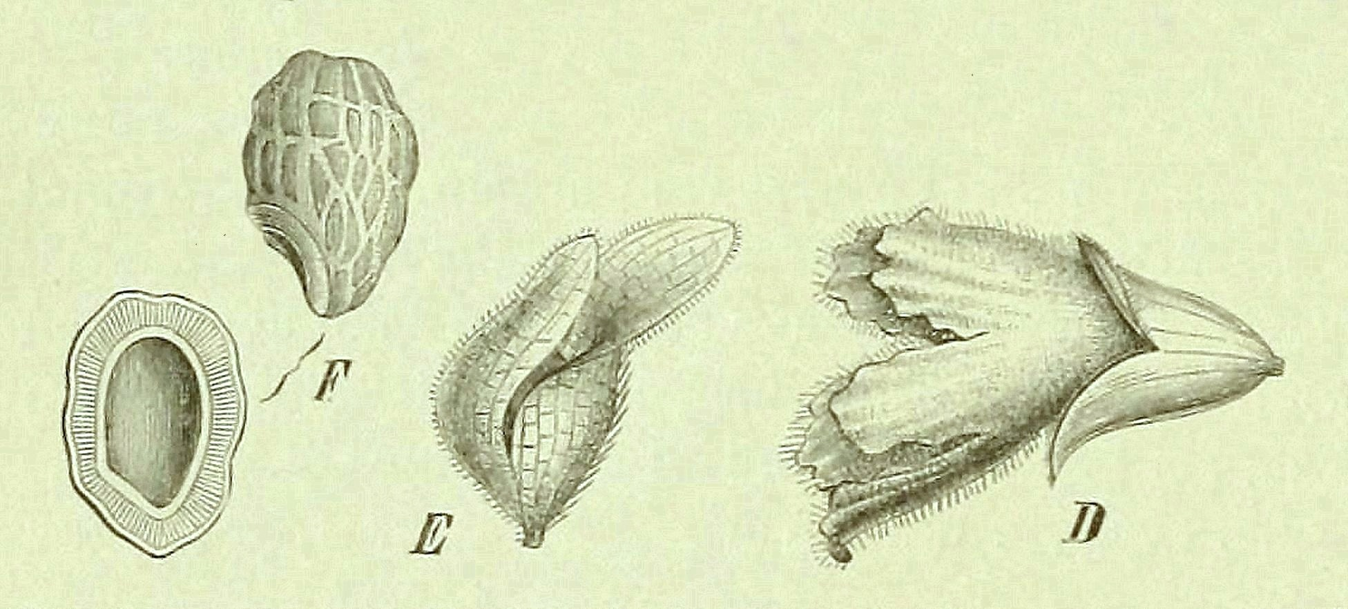 Prostanthera lasianthos en Adolf Engler & Karl Prantl, Die Natürlichen Pflanzenfamilien : nebst ihren , 1887, p. 220 - D: Flor, vista lateral, E: Cáliz bilabiado en la fructificación, F: Mericarpo reticulado y el mismo en corte transversal.